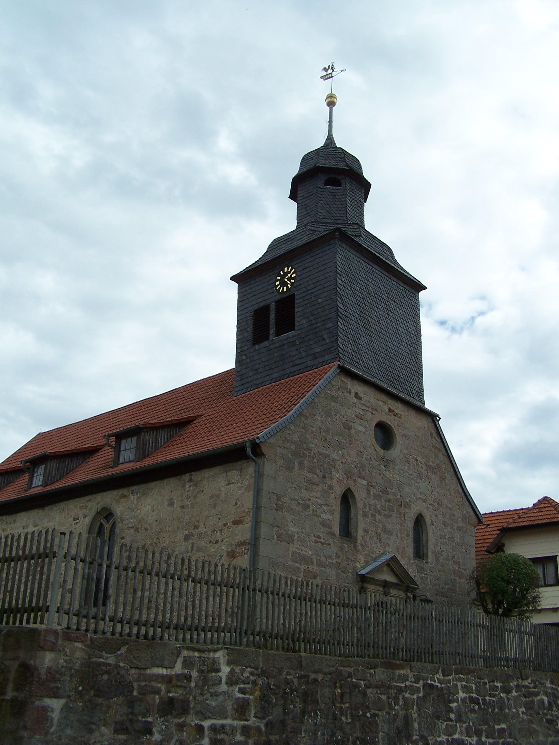 Ansichten und Impressionen der Evangelischen Kirche in Unteralba, Gemeinde Dermbach in der Thüringischen Rhön.